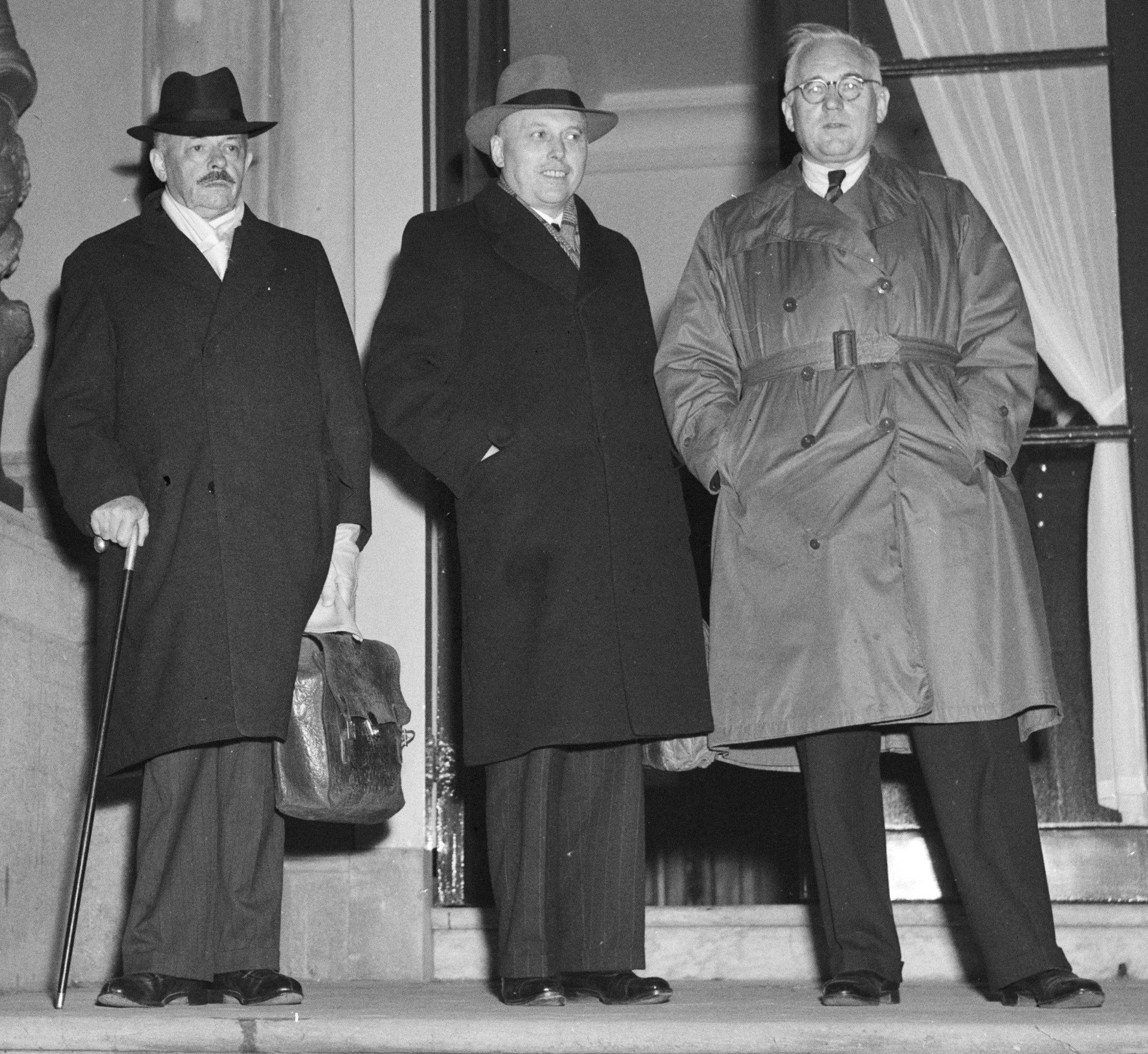 Collectie / Archief : Fotocollectie Anefo Reportage / Serie : [ onbekend ] Beschrijving : Commissie-Generaal bij de Koningin; Van de Poll , Schermerhorn, De Boer Datum : 2 december 1946 Locatie : Den Haag, Zuid-Holland Trefwoorden : commissies Persoonsnaam : Boer, De, Poll van De Fotograaf : Wisman, Bram / Anefo Auteursrechthebbende : Nationaal Archief Materiaalsoort : Negatief (zwart/wit) Nummer archiefinventaris : bekijk toegang 2.24.01.04 Bestanddeelnummer : 901-9650